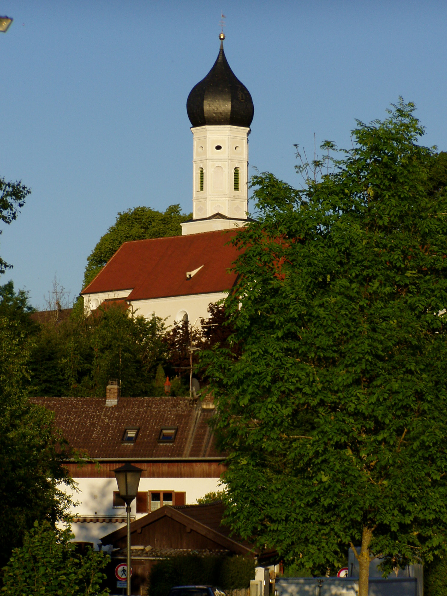 Kirche in Iffeldorf, Lkr Weilheim-Schongau